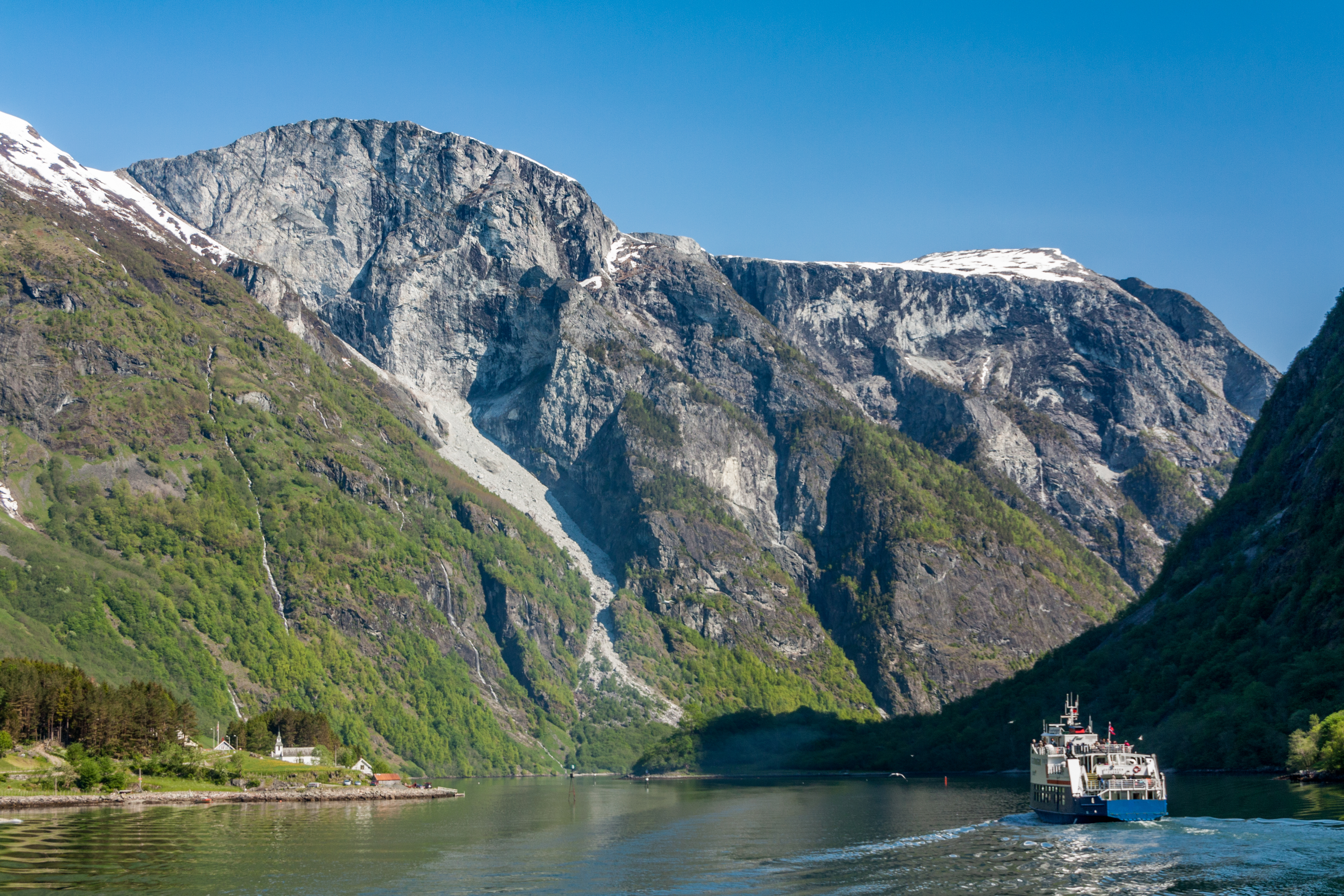 Nærøyfjord near Bakka